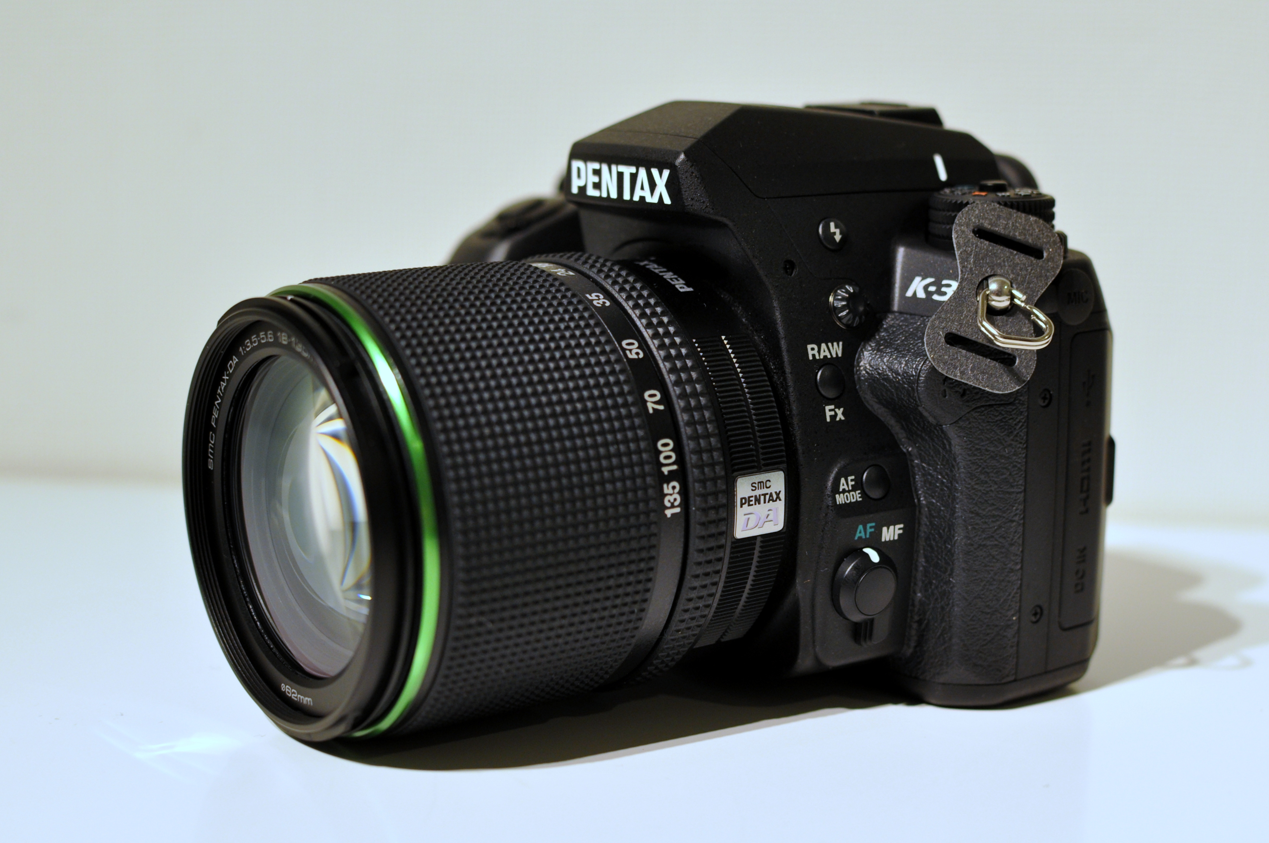 PENTAX K-3